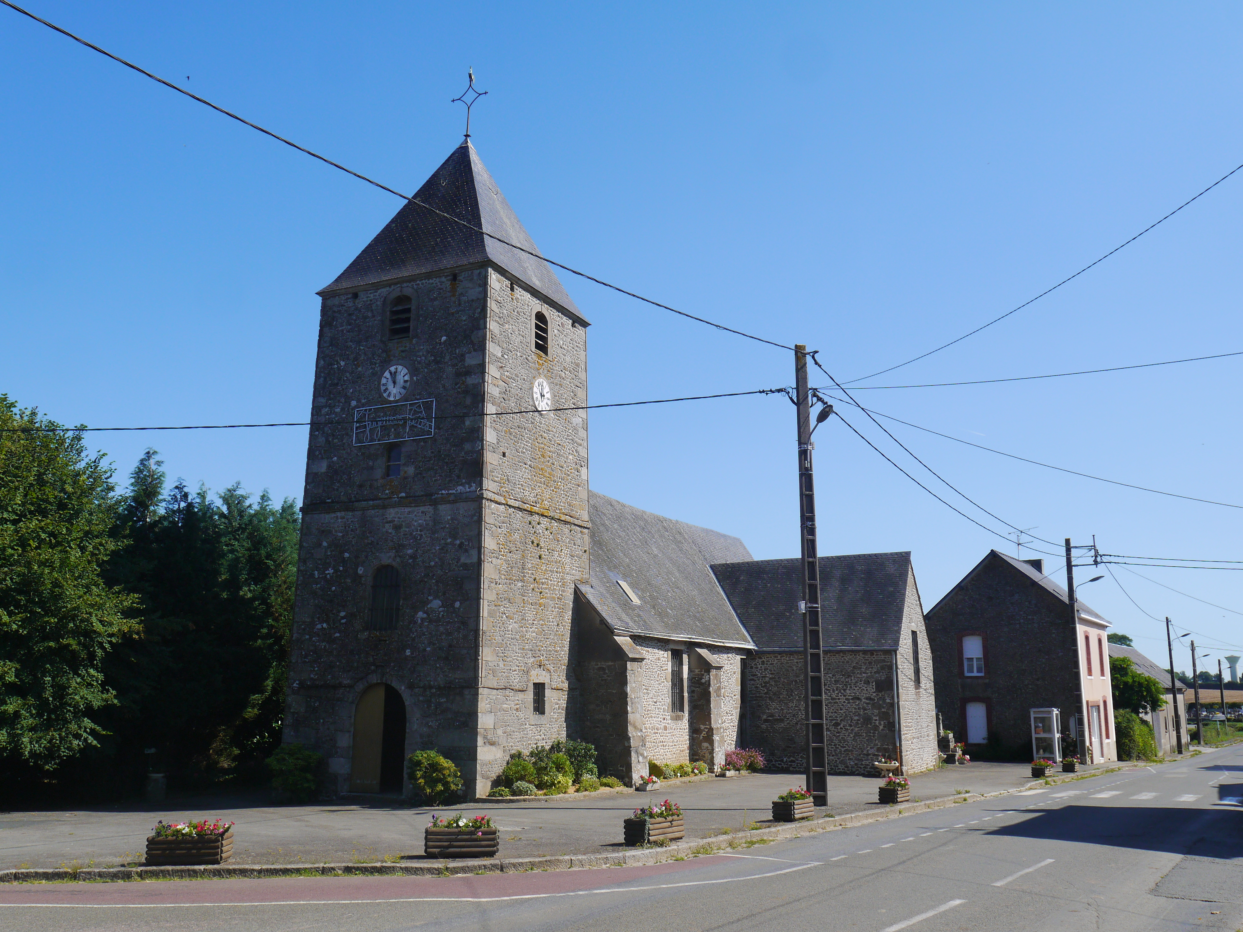 L'église.